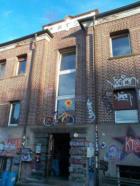 Autonomes Zentrum KTS auf dem Bahnbetriebsgelände in Freiburg